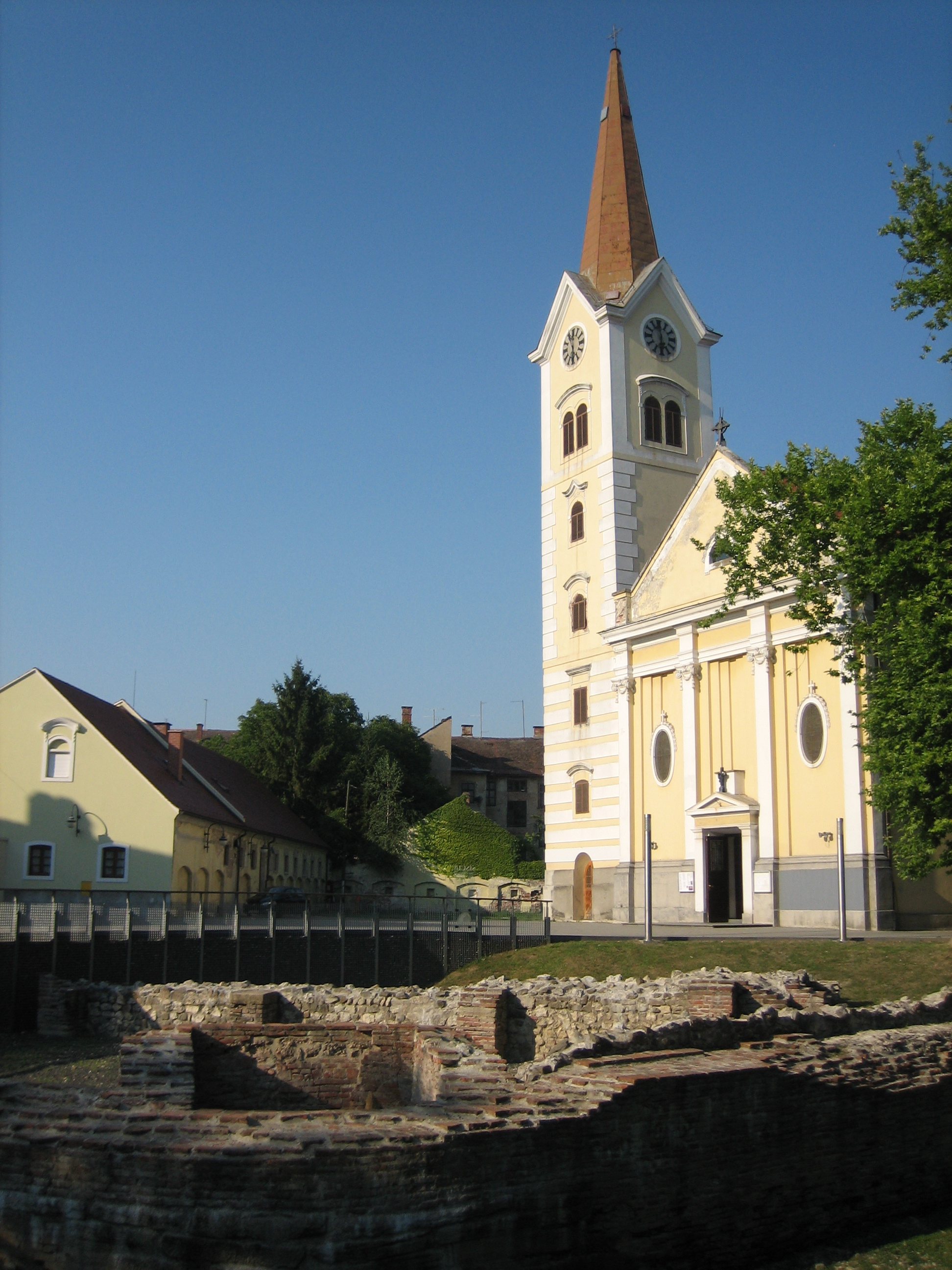 Holy Cross Roman Catholic churc in Sisak, Croatia, 17-18th cent. / Crkva Uzvišenja sv. križa (17.-18. st.) u Sisku, s ostacima zidina rimske Siscije.